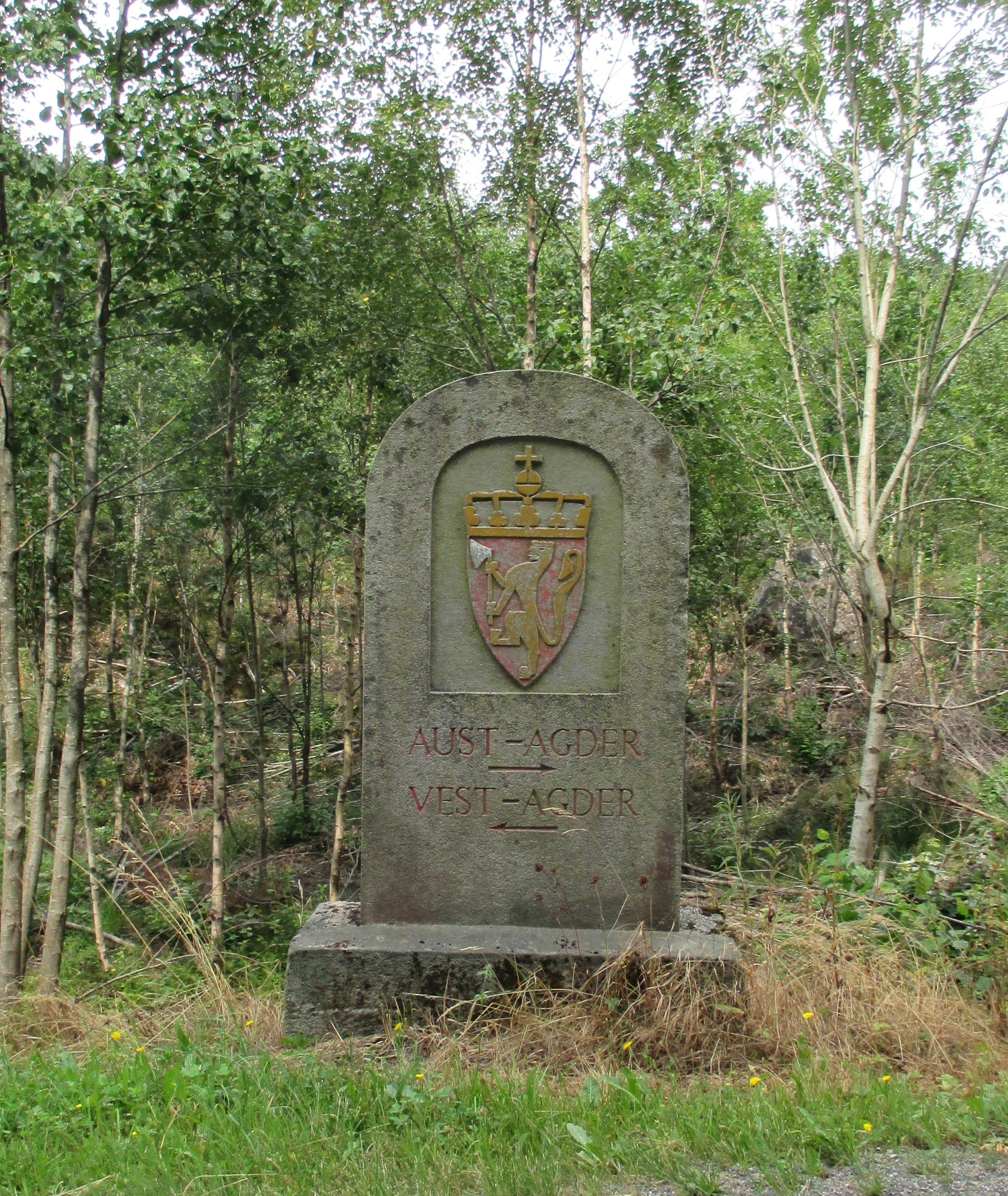 Grensestein mellom kommunene Vennesla og Birkenes i hhv. Vest-Agder og Aust-Agder fylke. Til venstre for steinen går fylkesvei 66 i Vest-Agder. Til høyre går fylkesvei 253 i Aust-Agder.